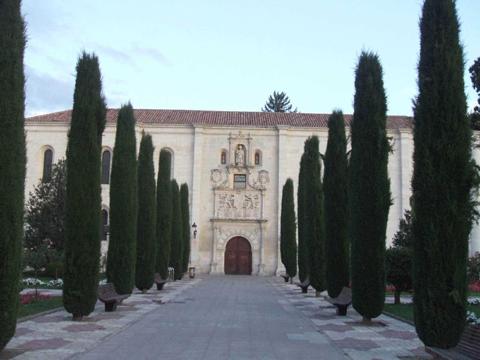 Colegio de San Nicolás (IES Cardenal Lopez de Mendoza), en Burgos